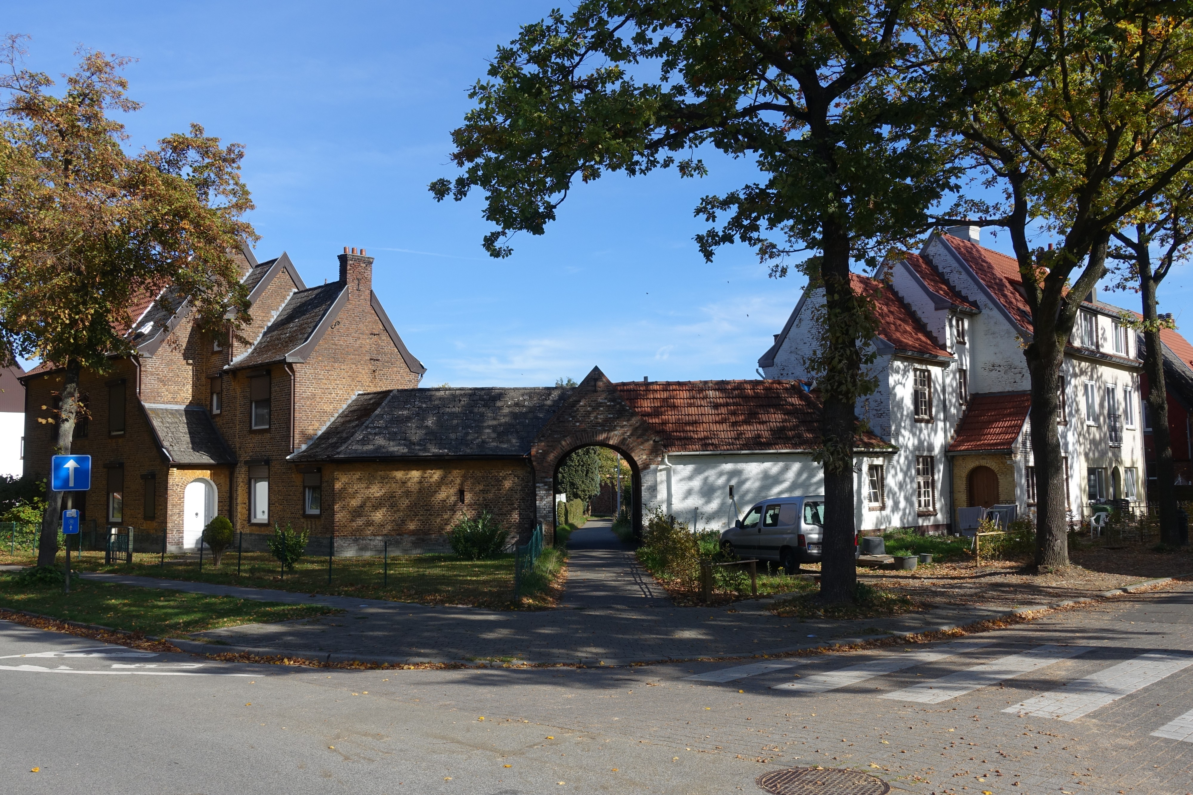 1ste Cité Mijncité in Winterslag. 1912-1920. Margarethalaan, Erfgoed 301957 This photo of immovable heritage has been taken in the Flemish Region